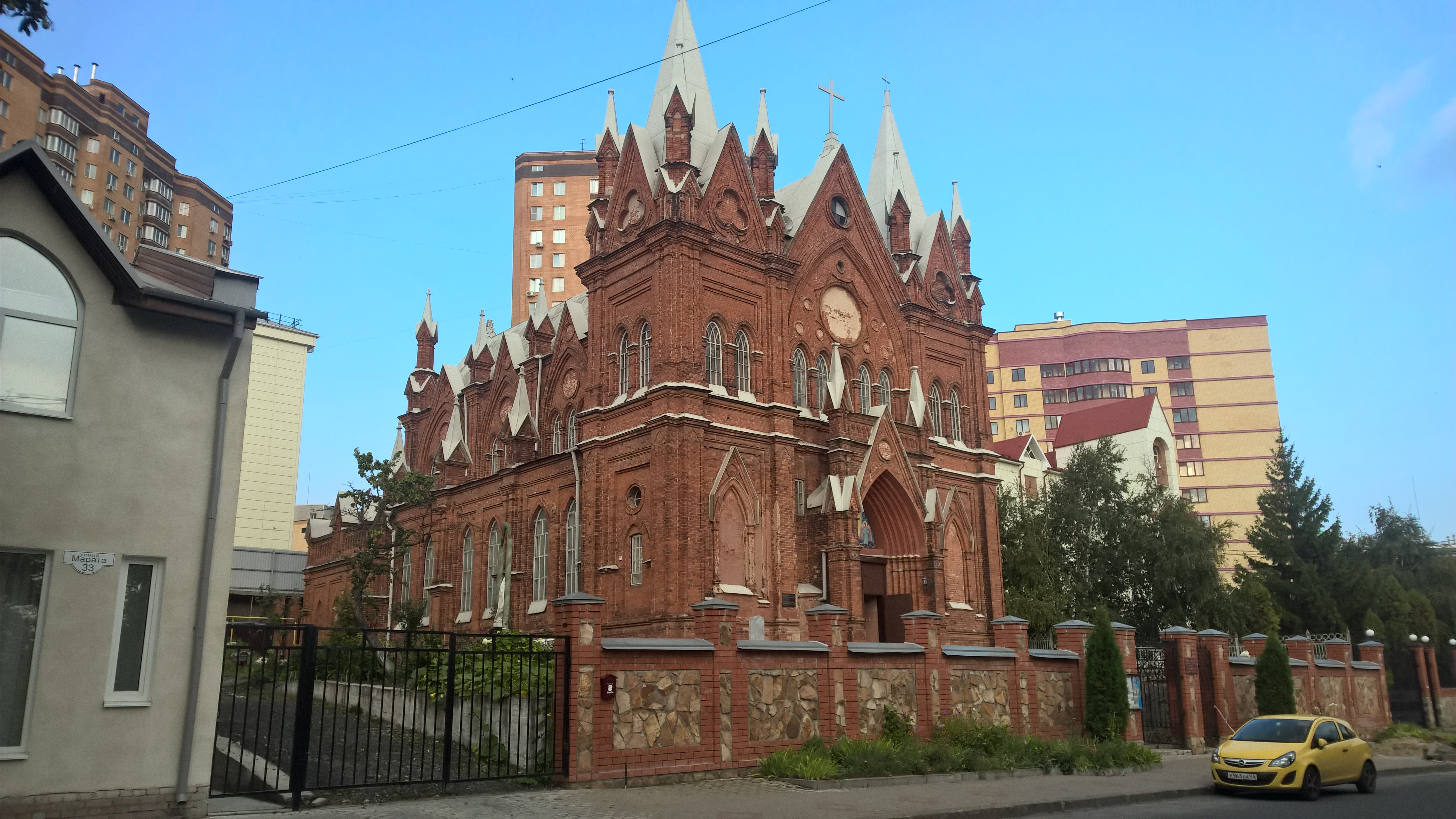 Польский костел: улица Марата, 31, Курск, Курская область